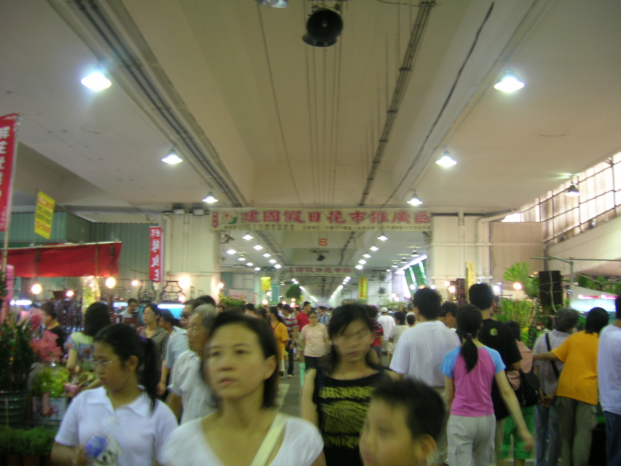 臺北市建國假日花市。